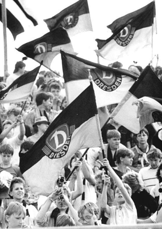 ADN-ZB-Häßler -24.5.89-frs- Dresden: Fußball-Oberliga- Dynamo Dresden - HFC Chemie 1:1 (0:1)- Nach der gewonnenen Meisterschaft stellte sich Dynamo Dresden erstmals vor heimischem Publikum vor und wurde von seinen Fans ausgiebig gefeiert.